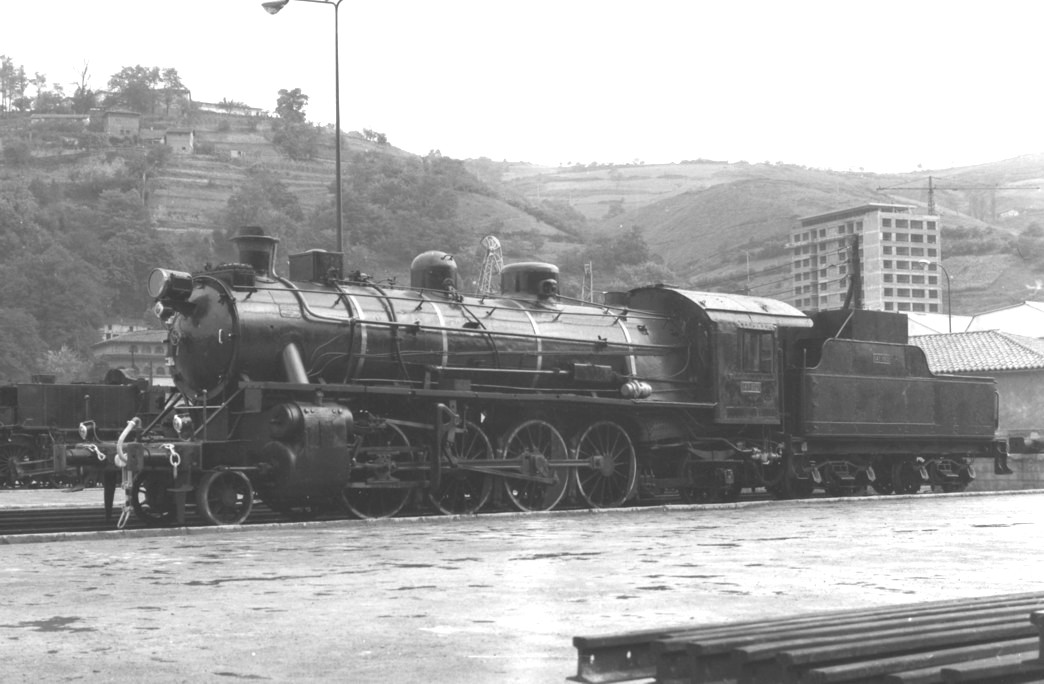 Locomotora 141-2001 a 2052 en Bilbao.